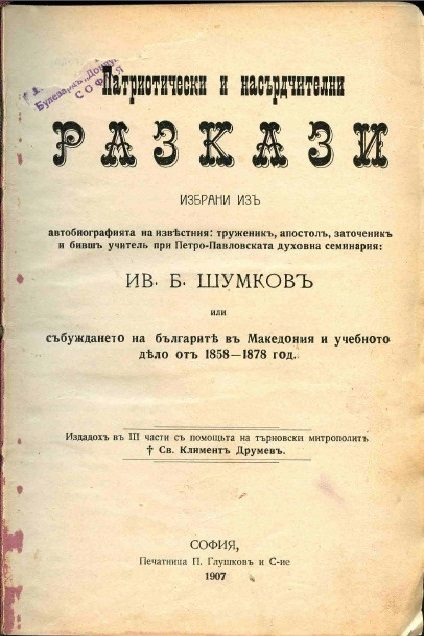 Корица на "Патриотически и насърчителни разкази"